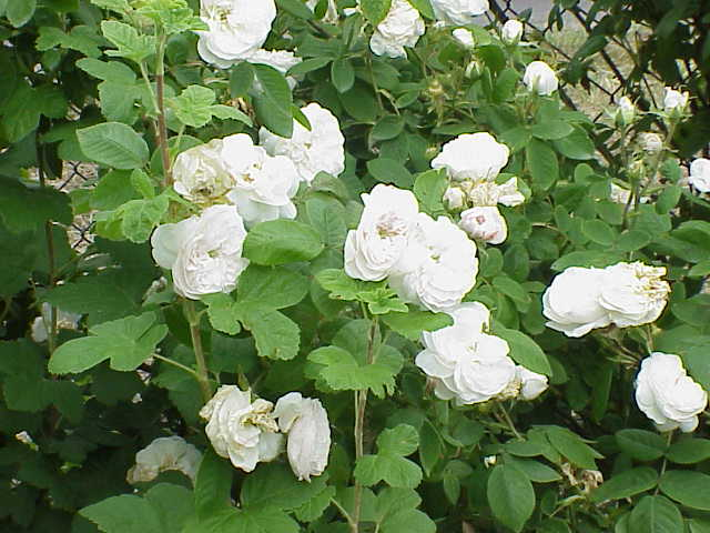 Species: Rosa damascena cultivar Family: Rosaceae Cultivar: Madame Hardy, Hardy 1832 Image No. 4